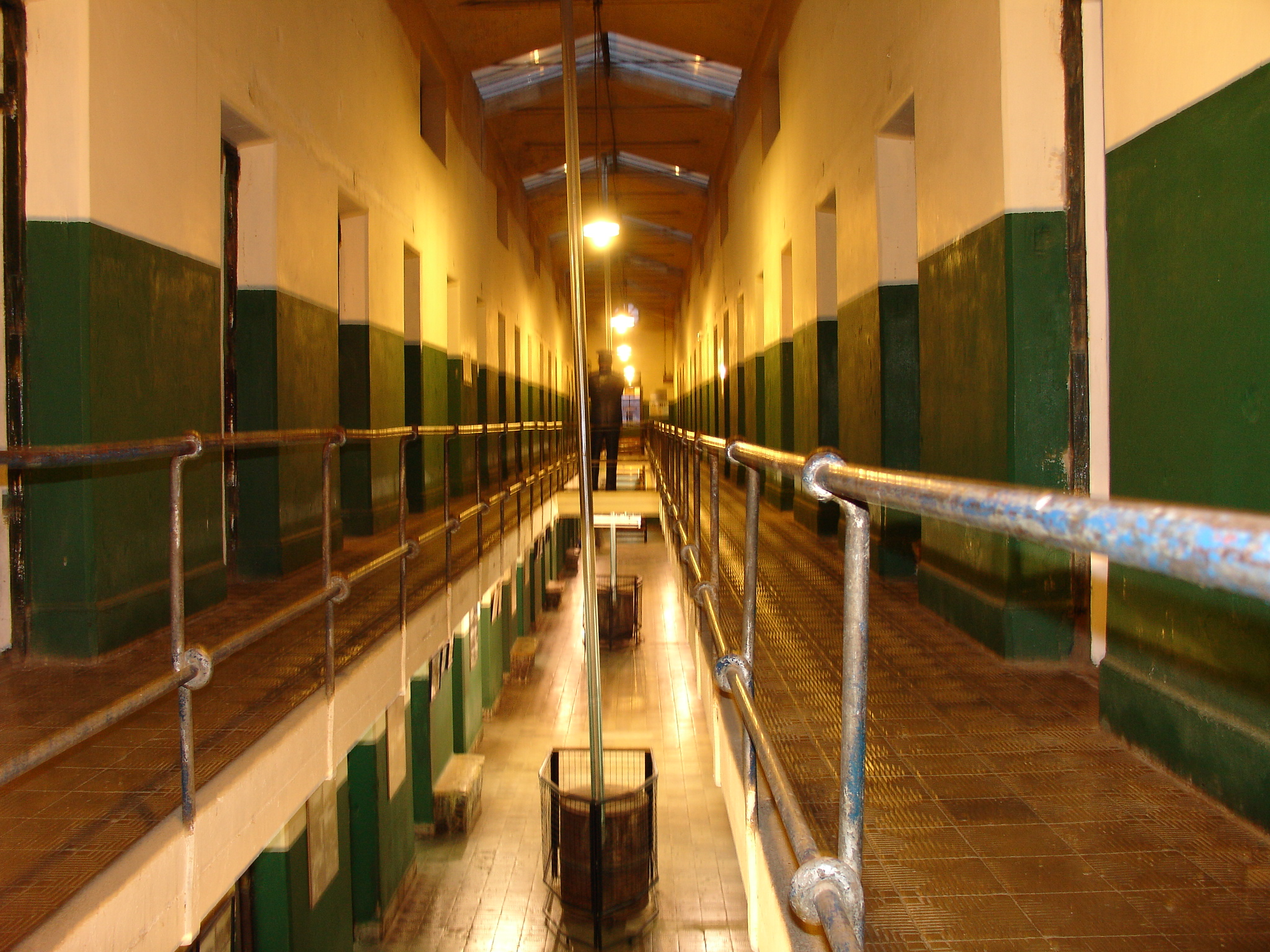 Ex presidio y actual museo de la ciudad de Ushuaia.